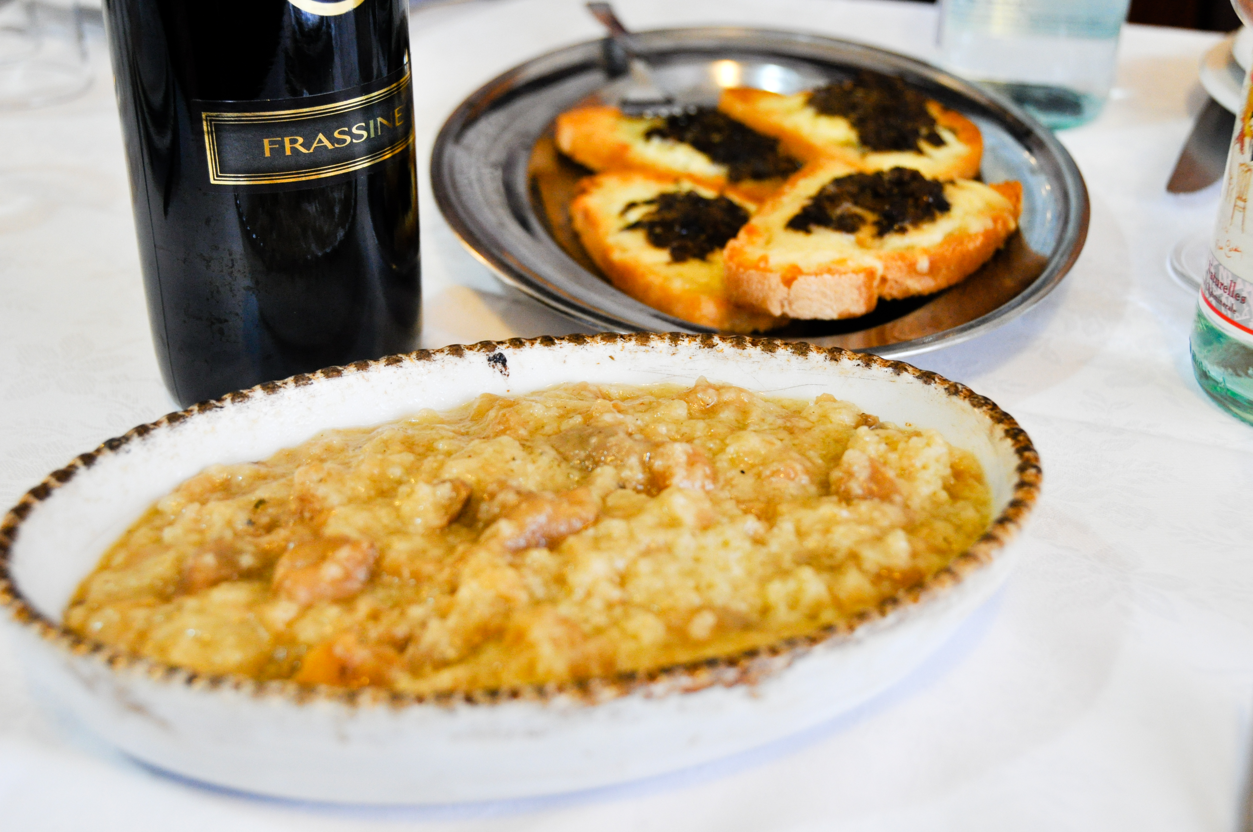 L'acquacotta de "il Rifugio" di Caprese Michelangelo